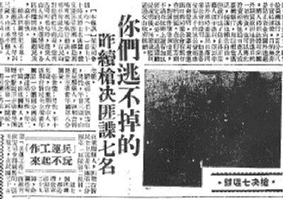 713澎湖事件報導